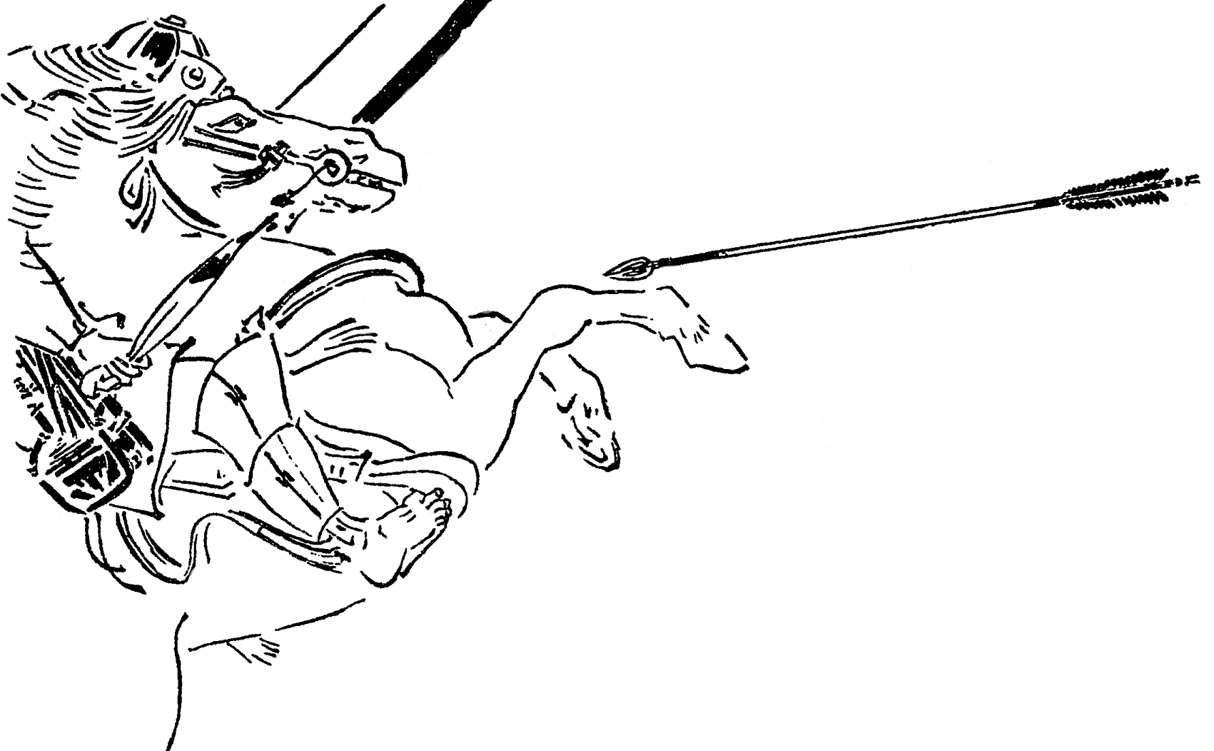 大庭景能（大庭景義）。平安時代末期 - 鎌倉時代初期／江戸時代『前賢故実』より。画：菊池容斎